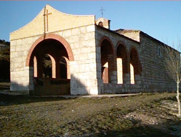 Hermita de San Vicente Ferrer (Esguevillas de Esgueva)